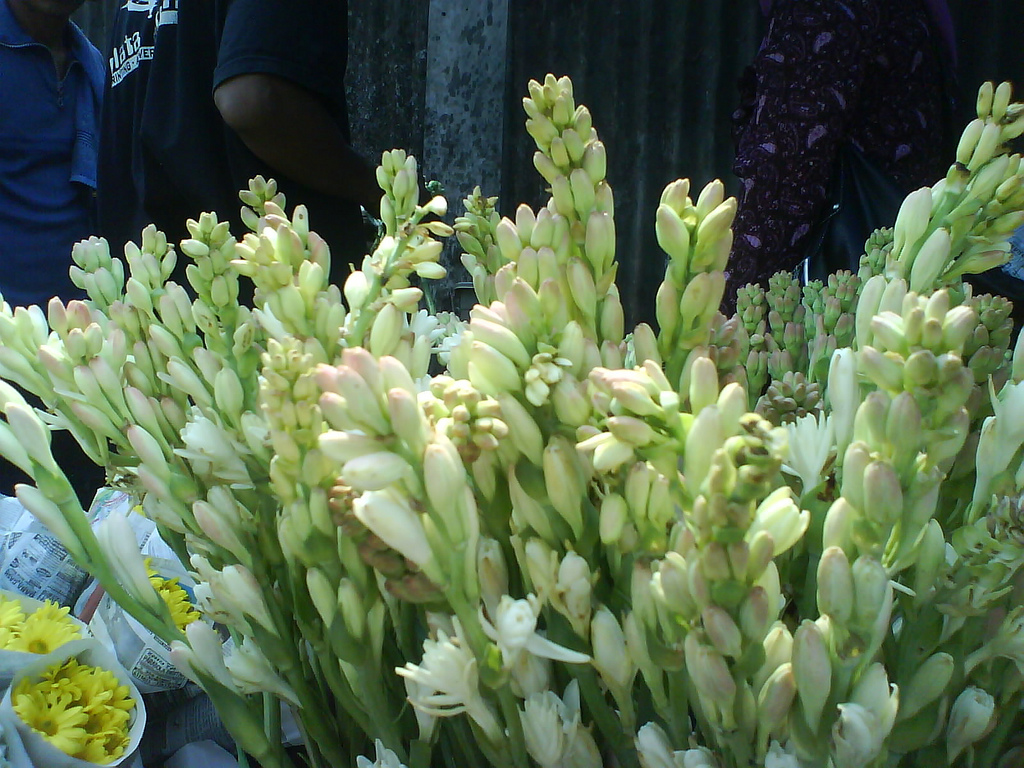 Polianthes tuberosa. Dijual 5000 per ikat.